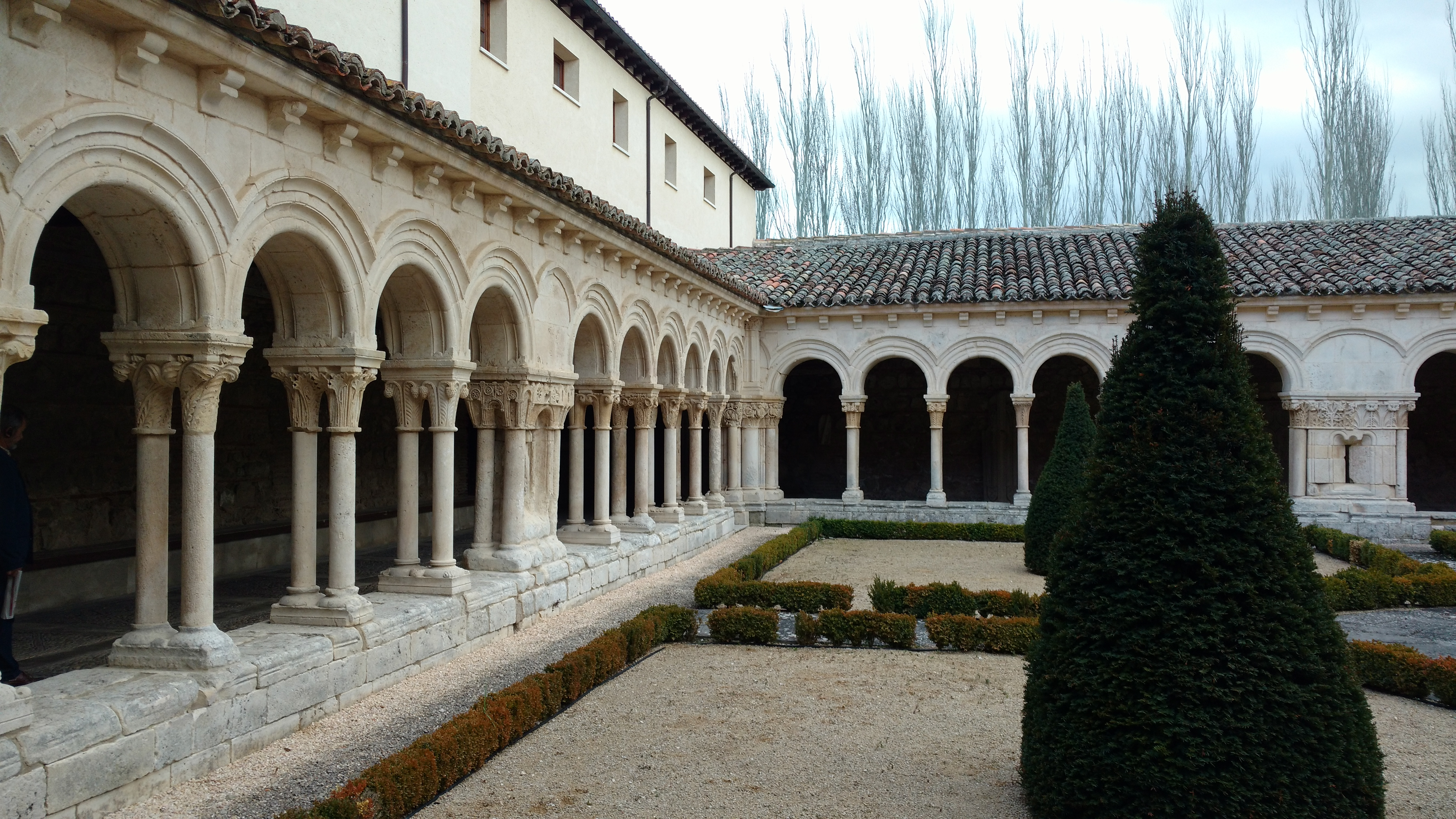 Claustro del monasterio de las Huelgas en Burgos.